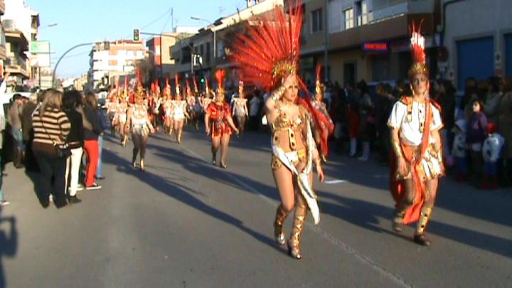 carnaval de Sangonera la Verde (Murcia) 2012